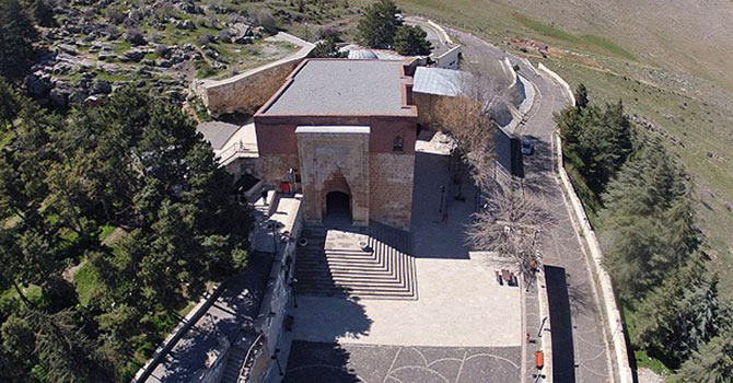 Kahramanmaraş Afşin'deki mağara. Kehf Sûresi'nde anlatılan mağara olduğu düşünülmektedir ve UNESCO Dünya Mirası Geçici Listesindedir.